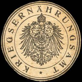 Sealing stamp Title: Kriegsernährungsamt Description: Briefsiegel, weiß, schwarz Place: size: 4 cm